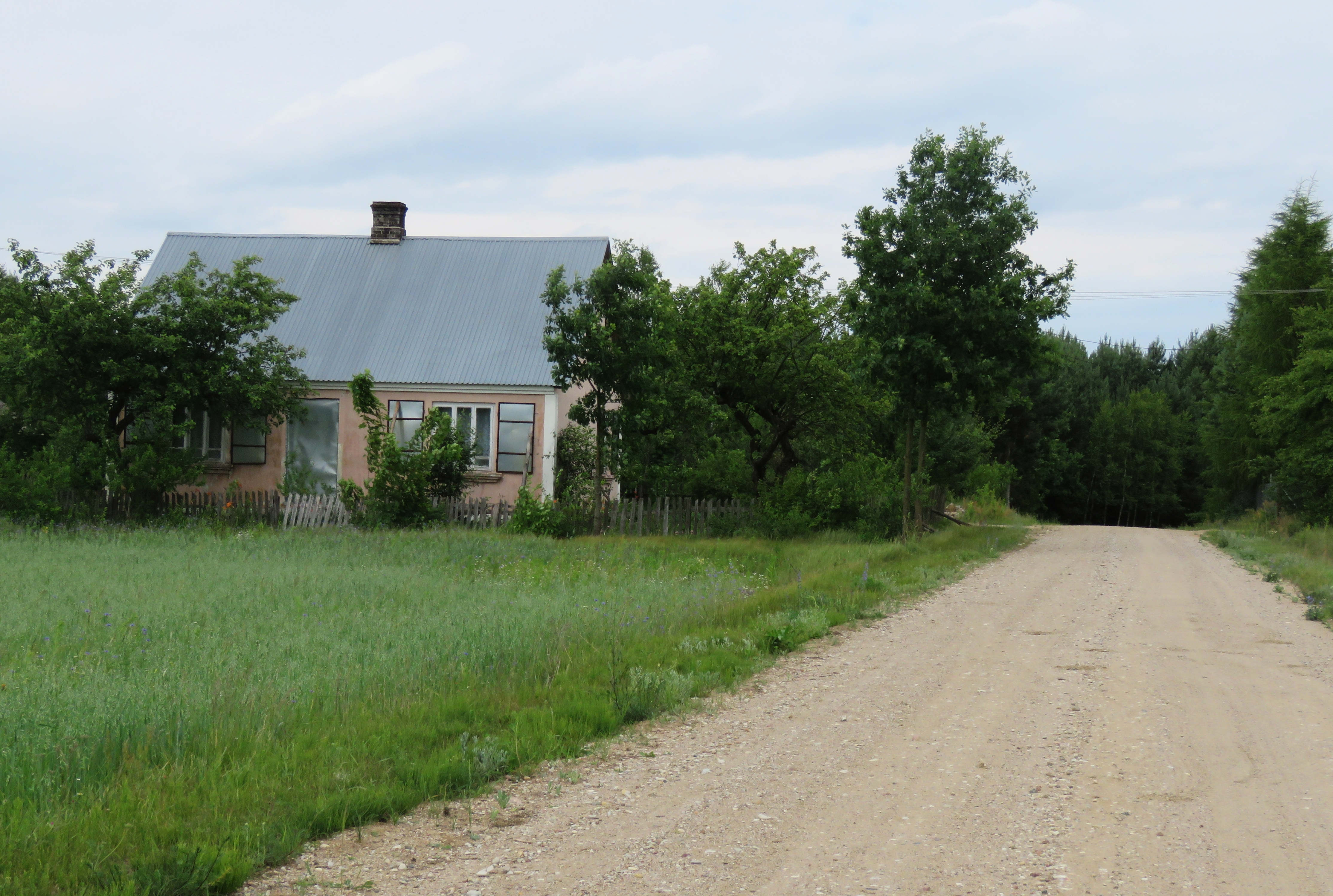 Końskie Góry